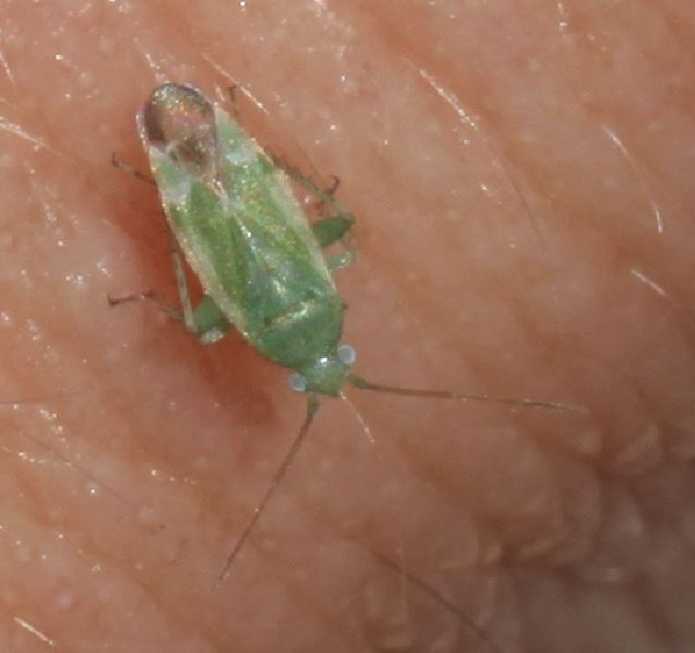 Weichwanzenart Tuponia cf. brevirostris am 25.6.2019 an der Côte d’Azur